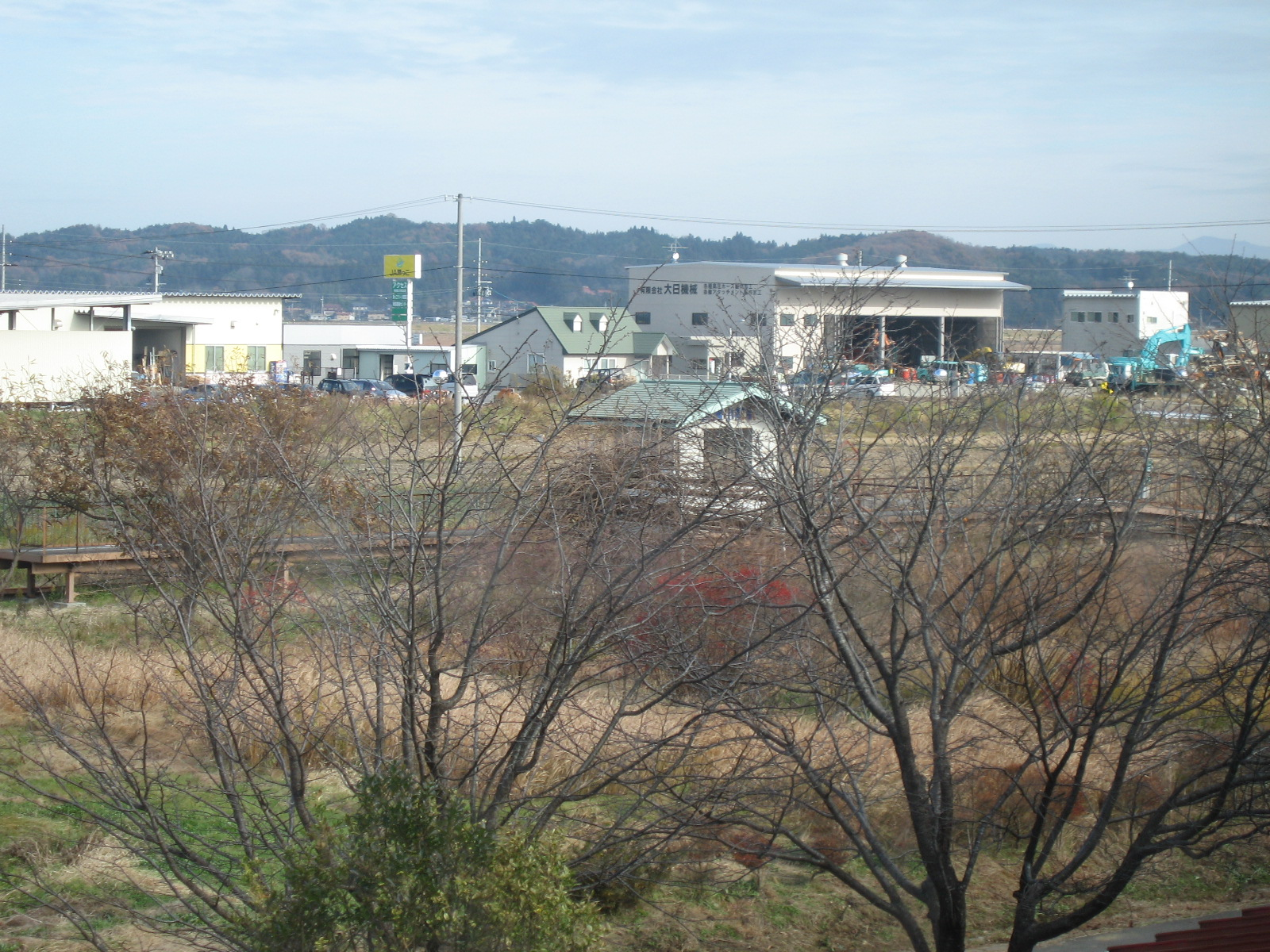 Ookashomae station, Kurihara Den-en Railway